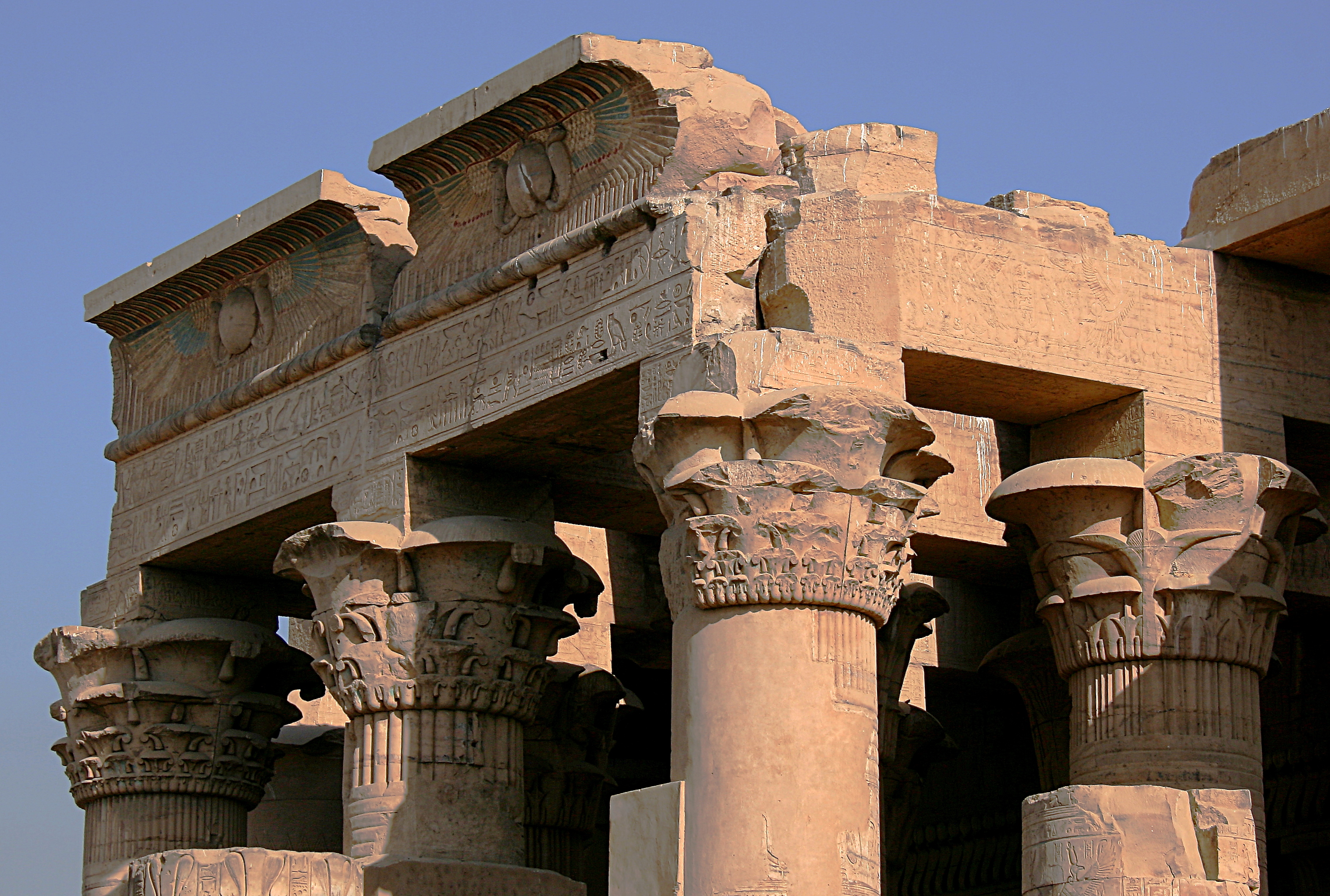 Tempel von Kom Ombo